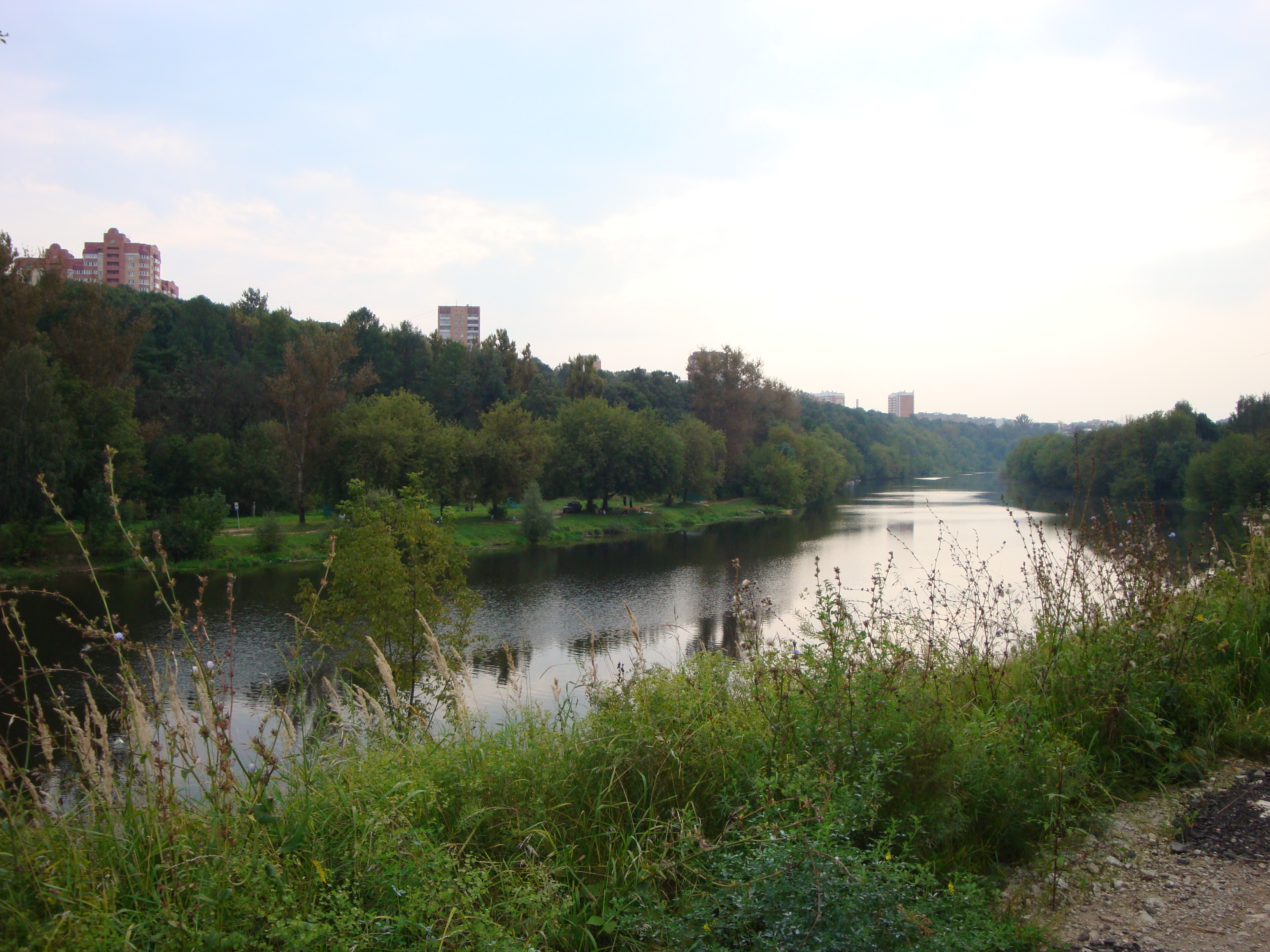 Река Пахра в городе Подольске и дома в Парковом микрорайоне